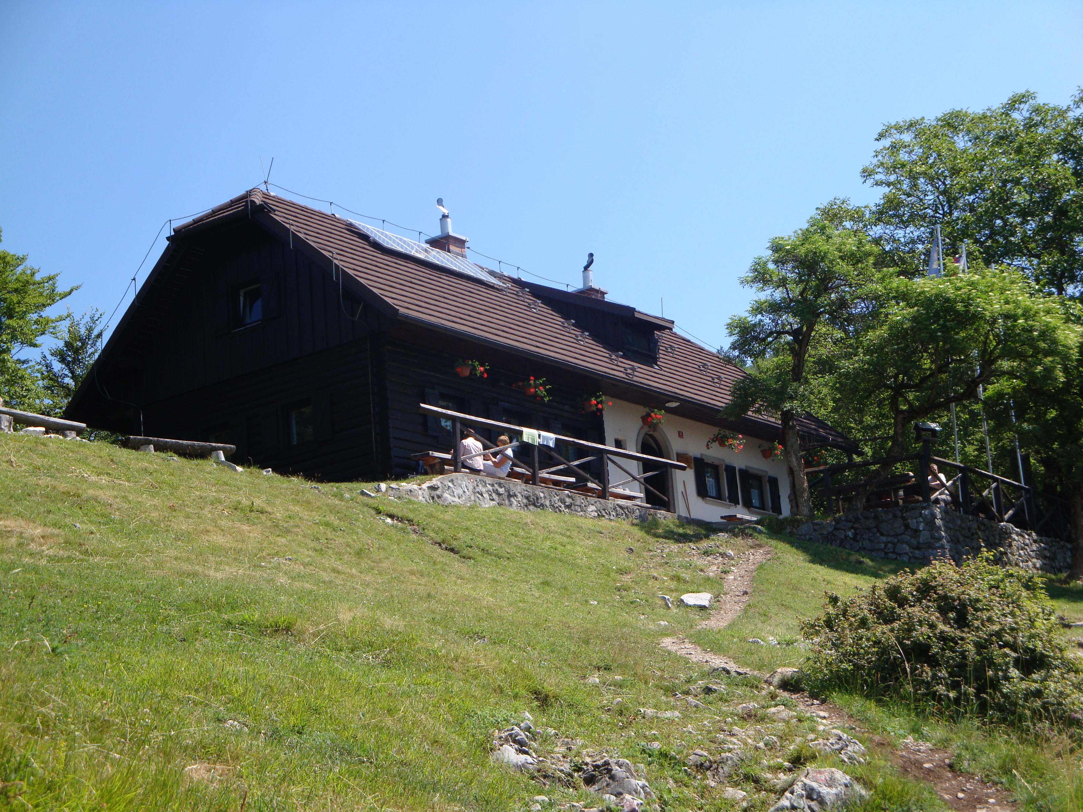 Planinska koča na Jakobu.